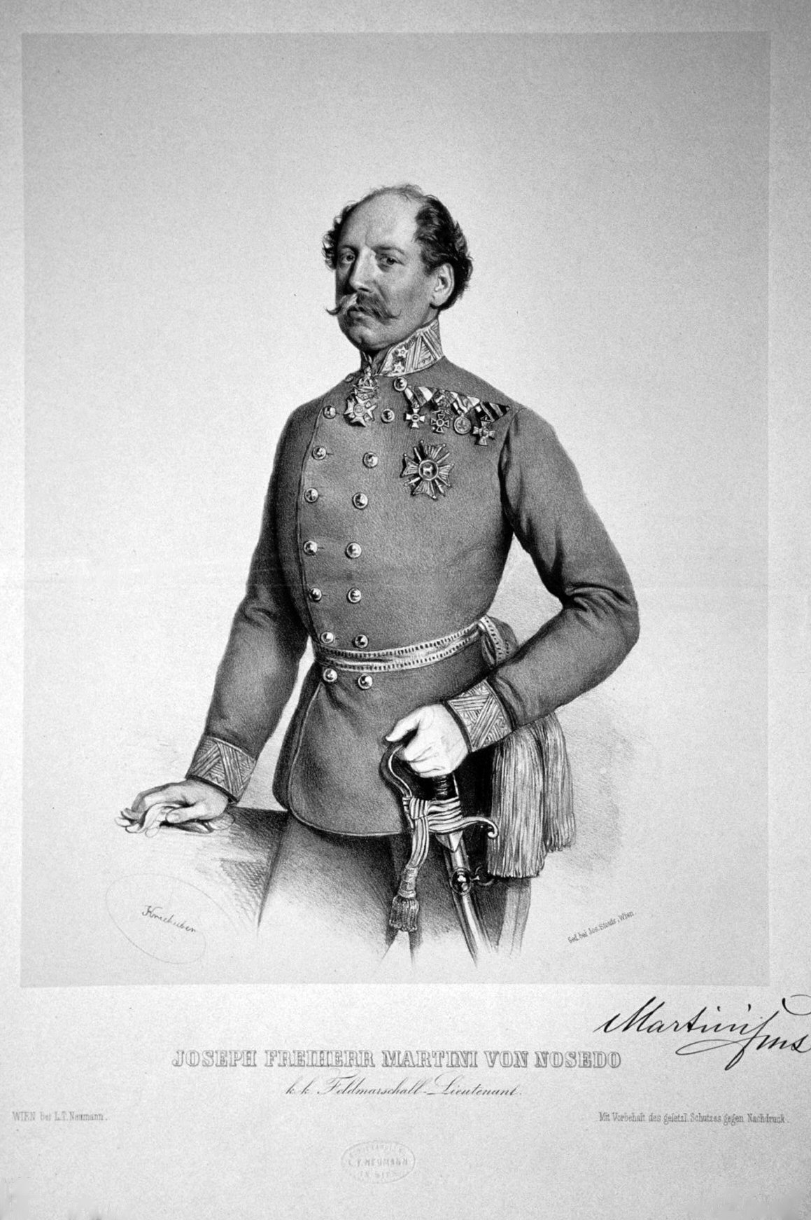 Josef Martini (1806-1868), Freiherr von Nosedo, Feldmarschallleutnant. Lithographie von Josef Kriehuber, 1857